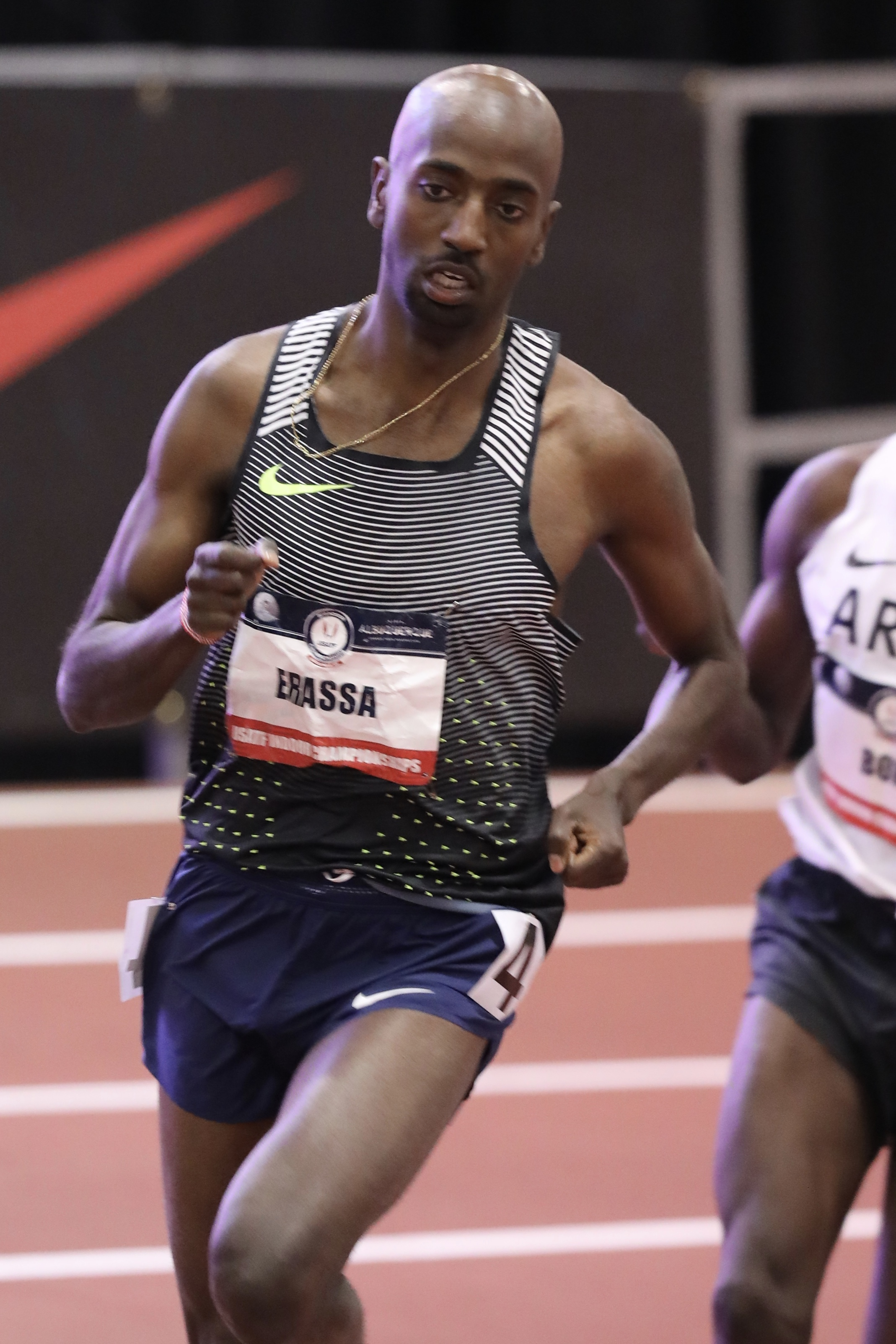 At USATF indoors 2018